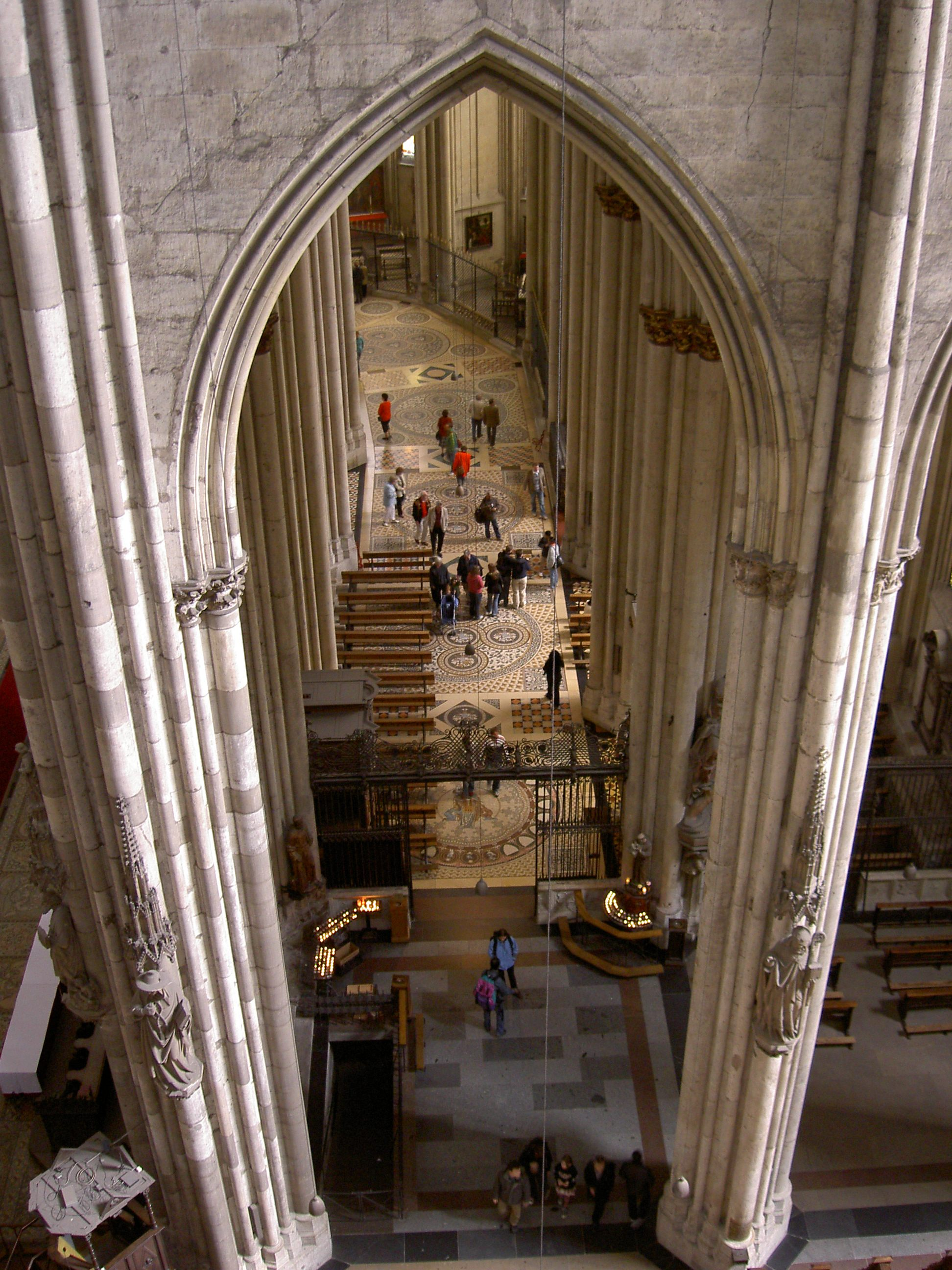 Kölner Dom, Blick in den südlichen Chorumgang vom Triforium im Mittelschiff / Cologne Cathedral, choir, south side